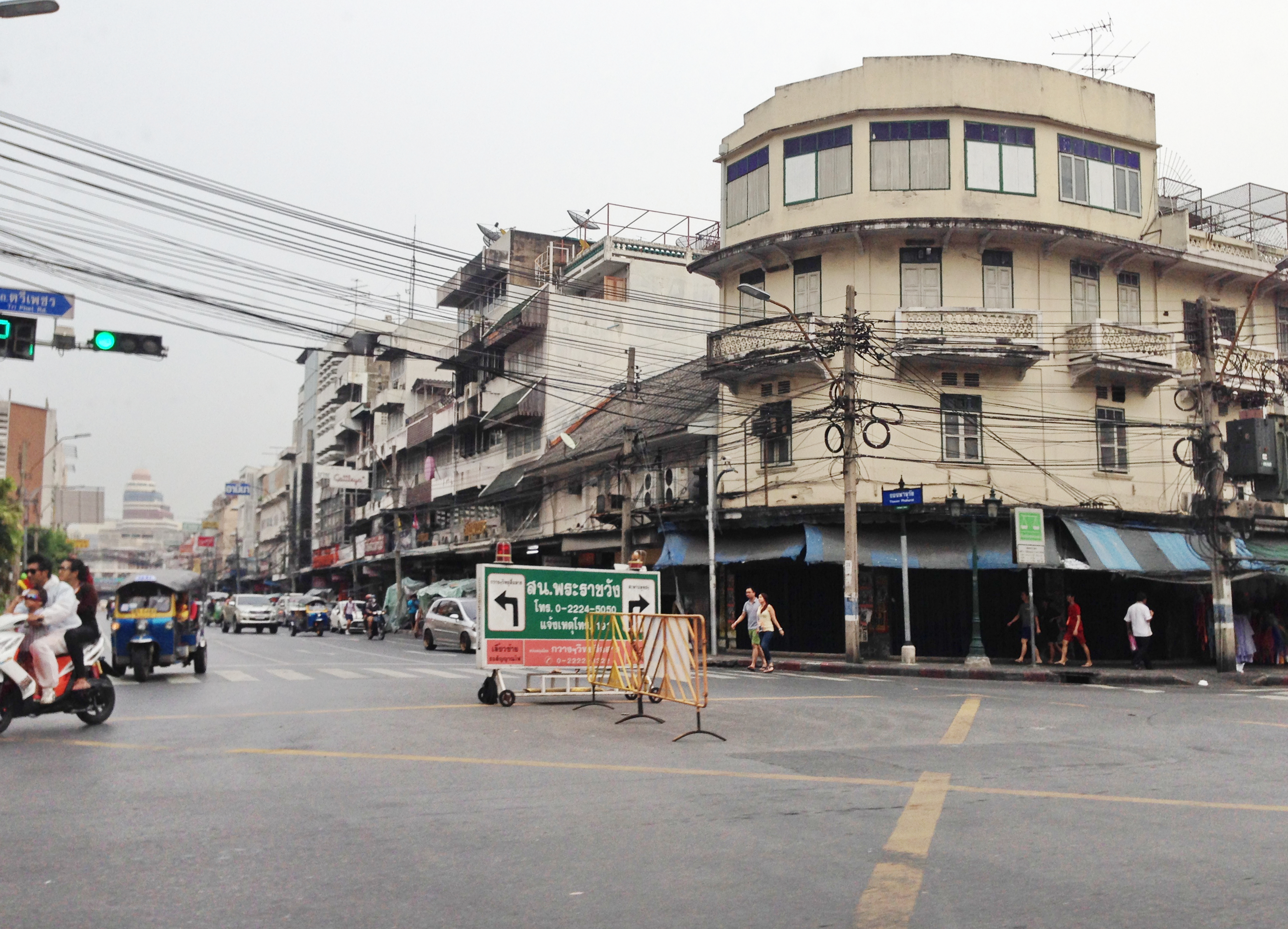 Wang Burapha Phirom, Phra Nakhon, Bangkok, Thailand